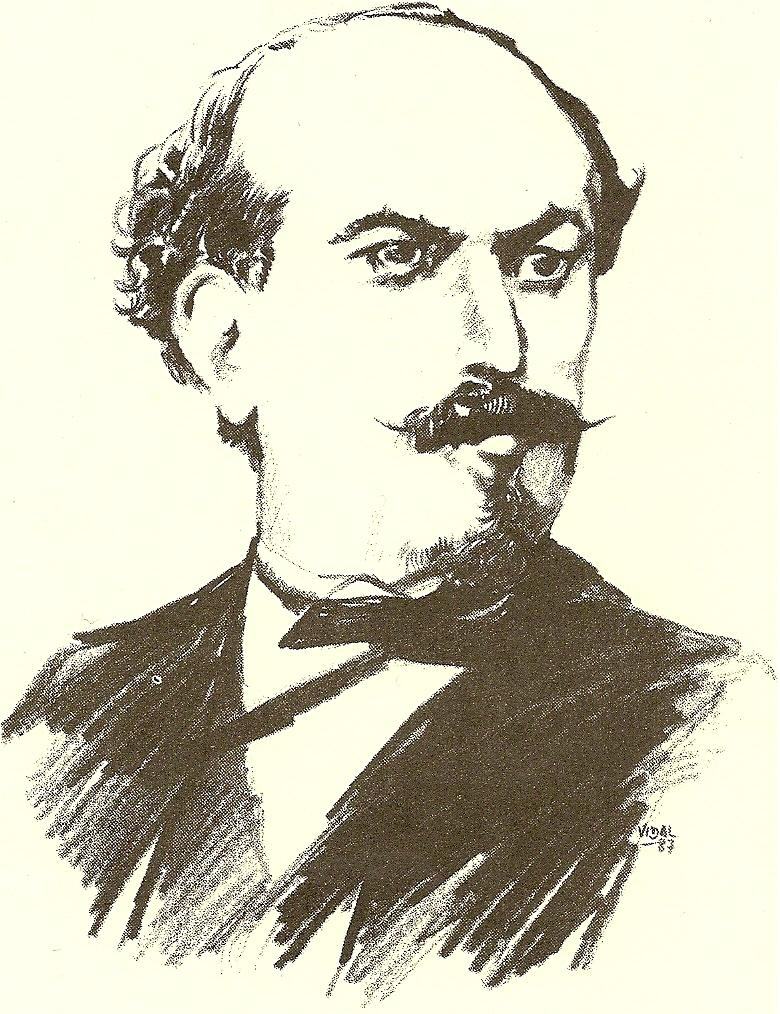 Dibujo de Juan José Vidal a partir de una fotografía publicada en la revista Zacatlán, noviembre de 1948.